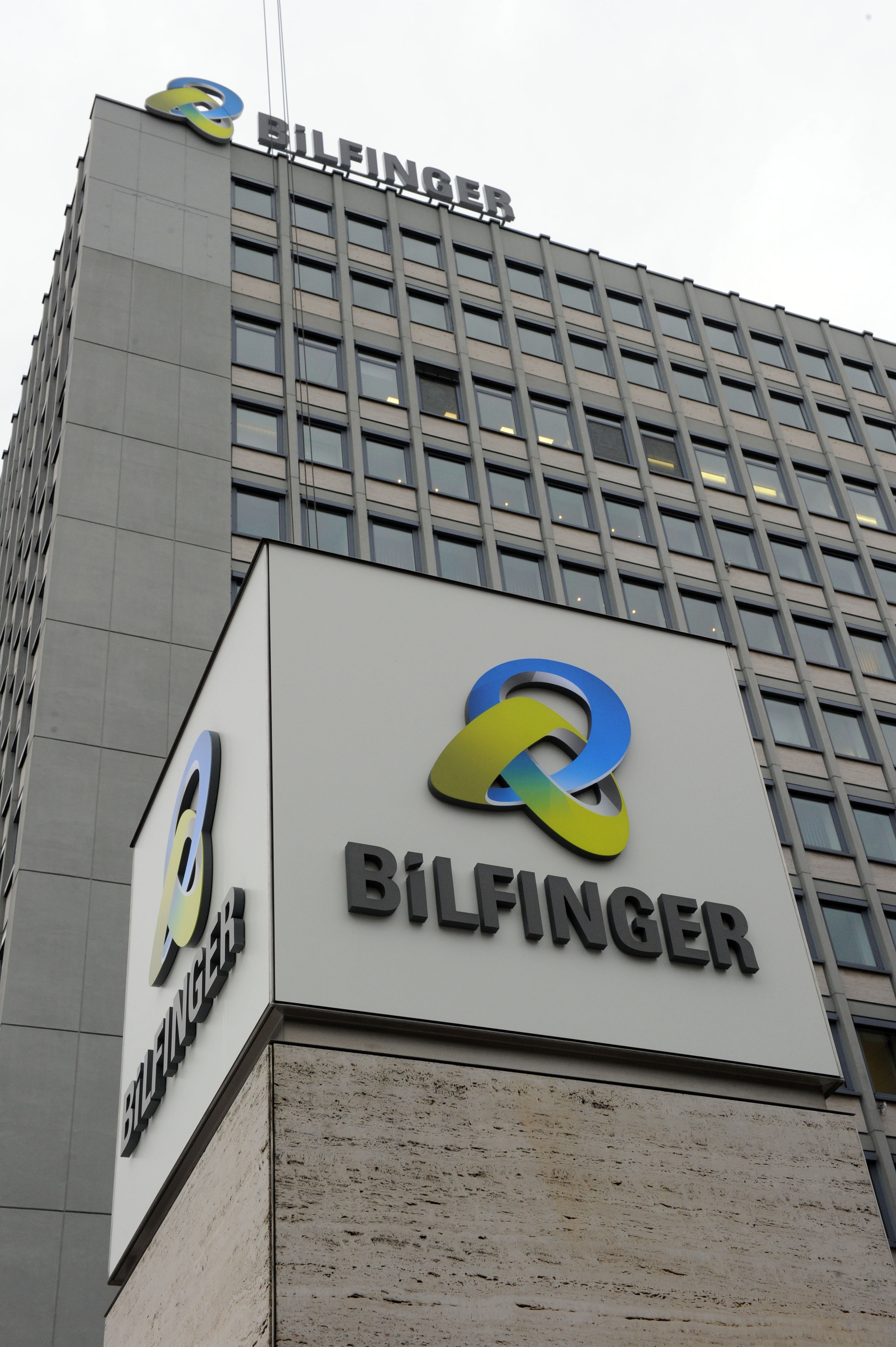 Brand Day, Mannheimer Zentrale